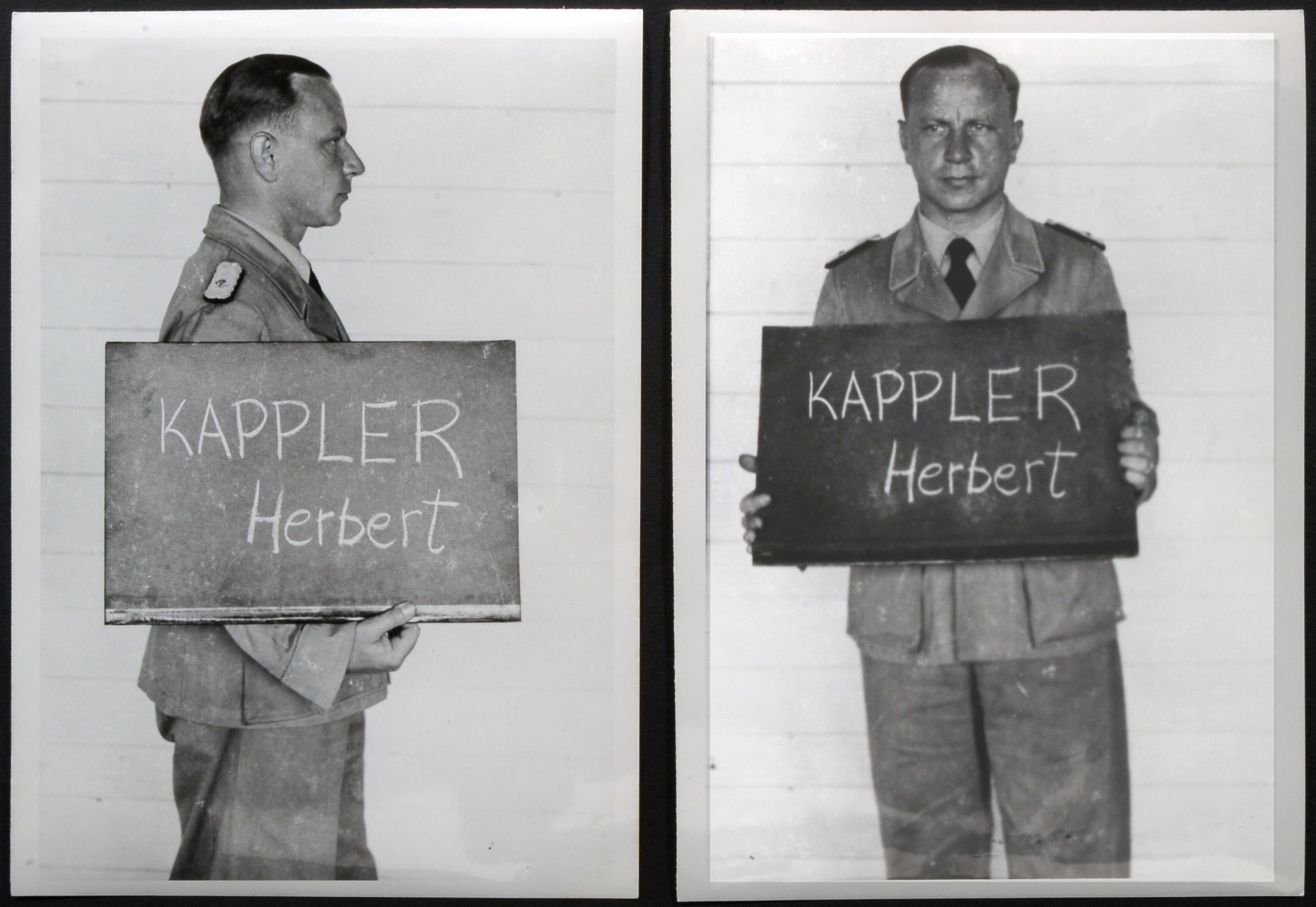 Foto di Herbert Kappler, scattata dagli Alleati il 9 maggio 1945 in Italia